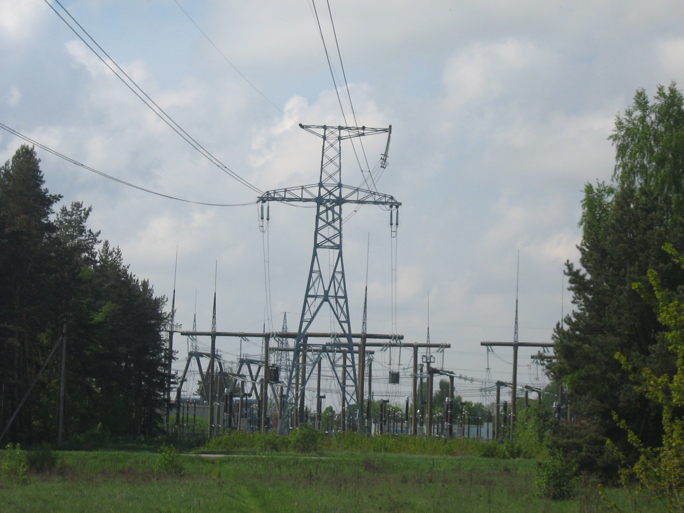 Elektra Jonavoje